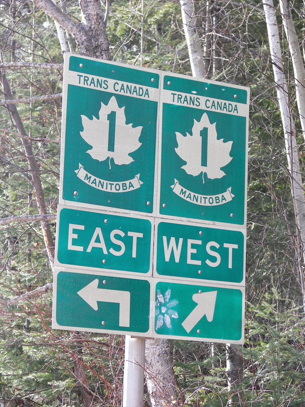 Signalisation routière sur la Transcanadienne